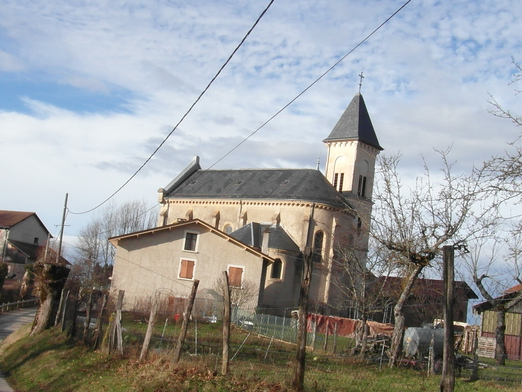 Église de Saint-Sixte